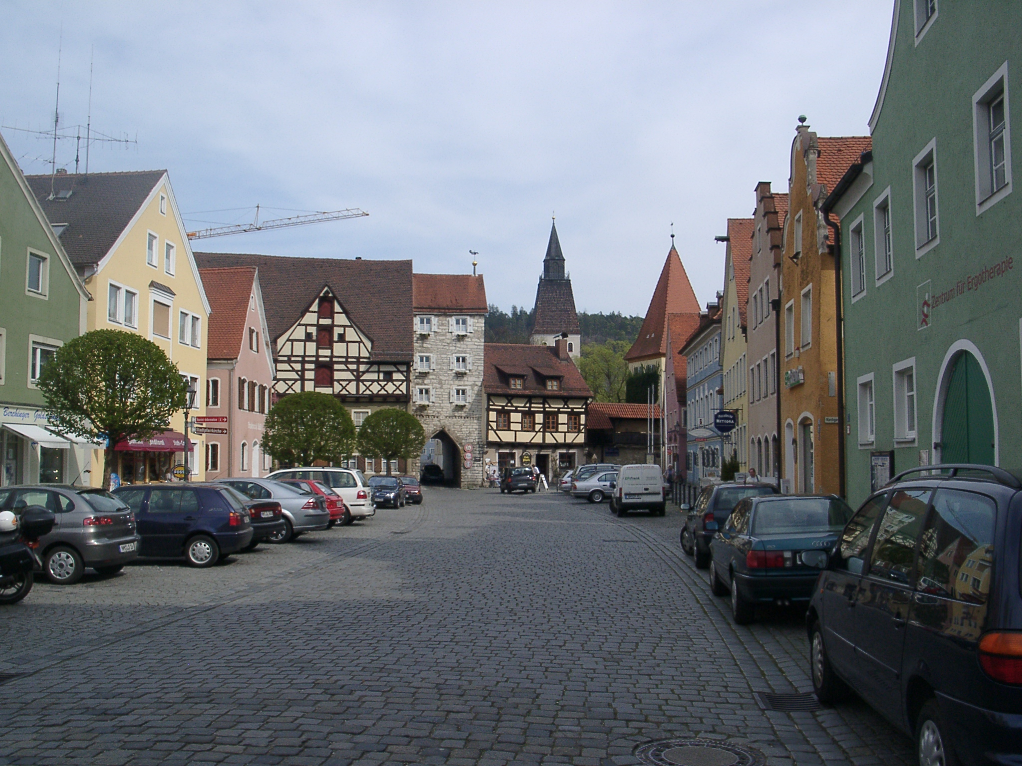 Berching, Hauptplatz